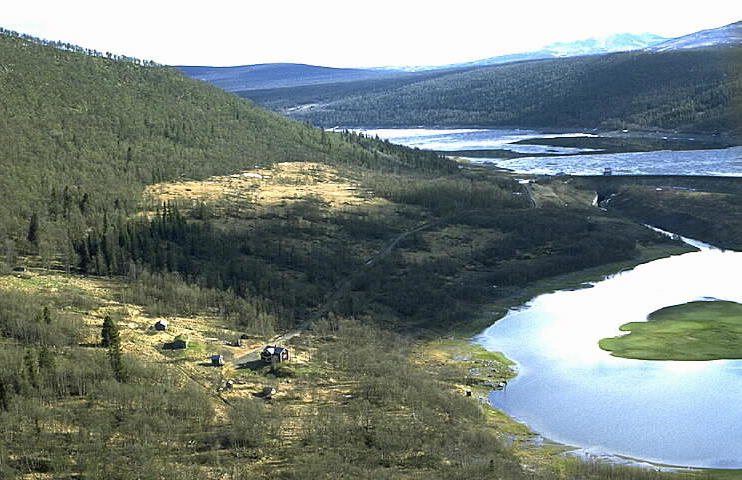 Ransarn i bildens högra del. Motiv: Övre Selet Nyckelord: Flygbilder, Riksintressen Kategori: Nybyggargård/fjällägenhetRansarn i bildens högra del.